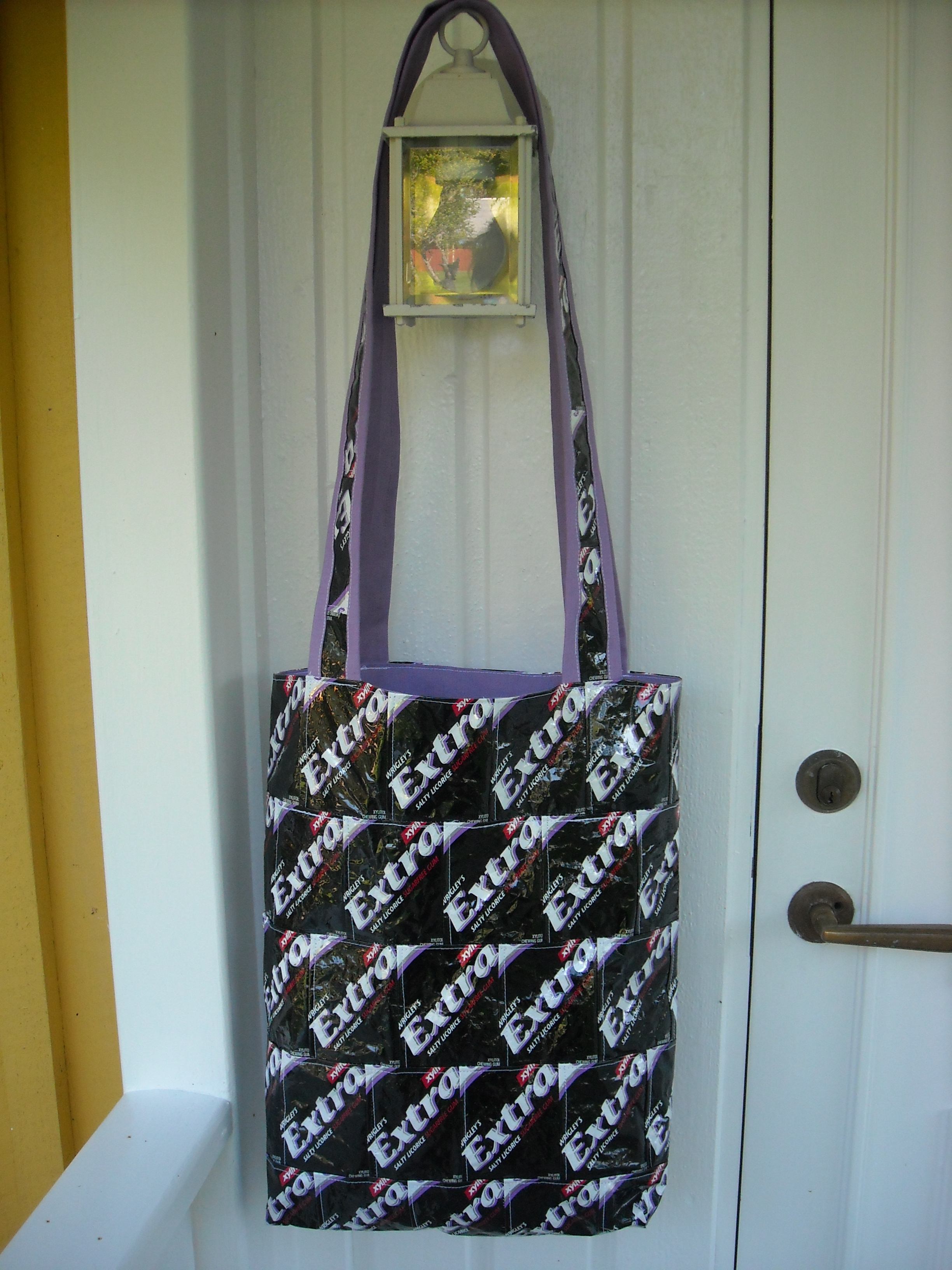 Axelväska i alternativt material, tuggummipaket.